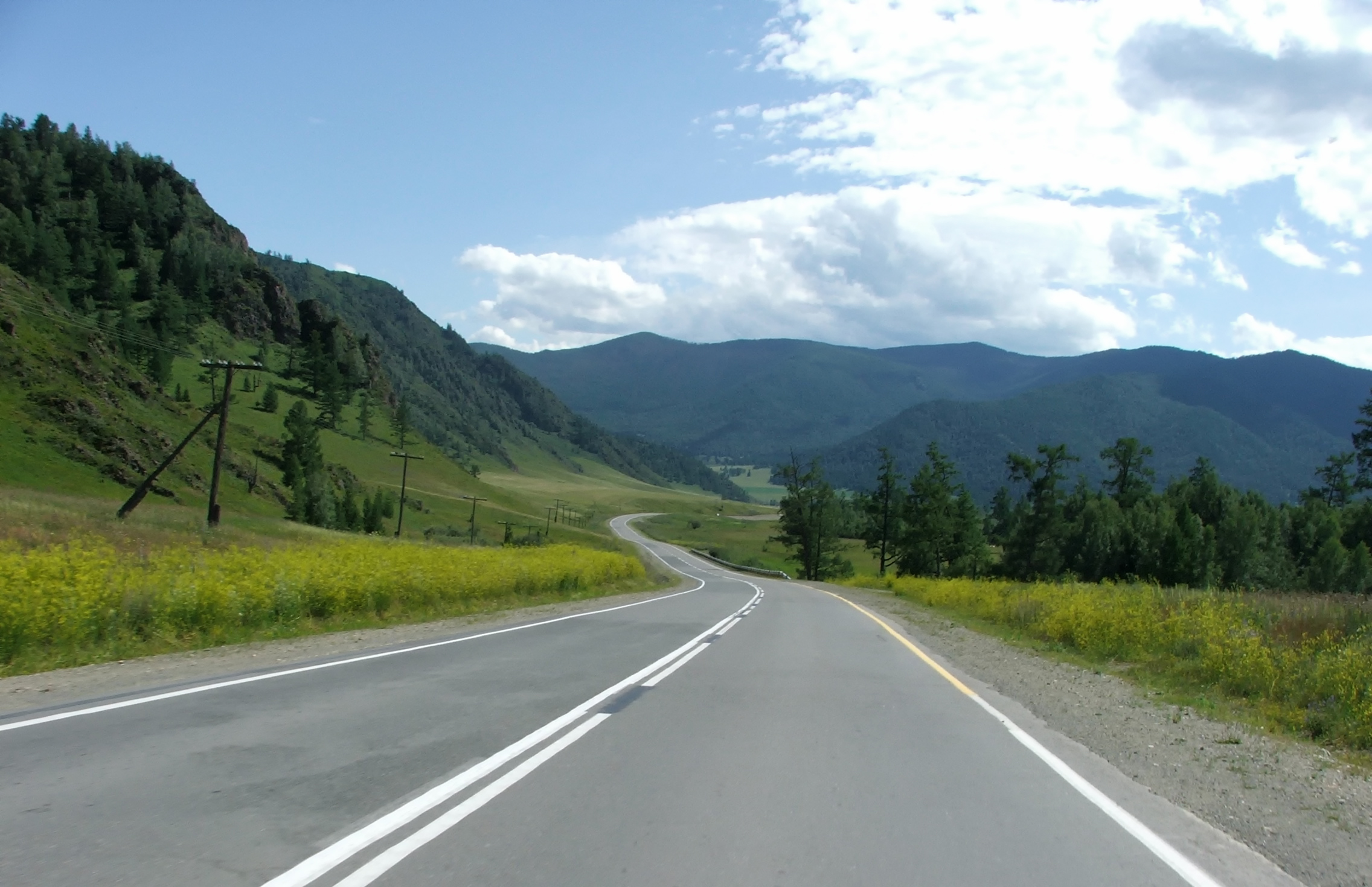 Перевал Семинский: В 10 км к югу от с. Топучая, в осевой зоне Семинского хребта.,Онгудайский район, Алтай This image is related to the protected area of Russia number 0410020